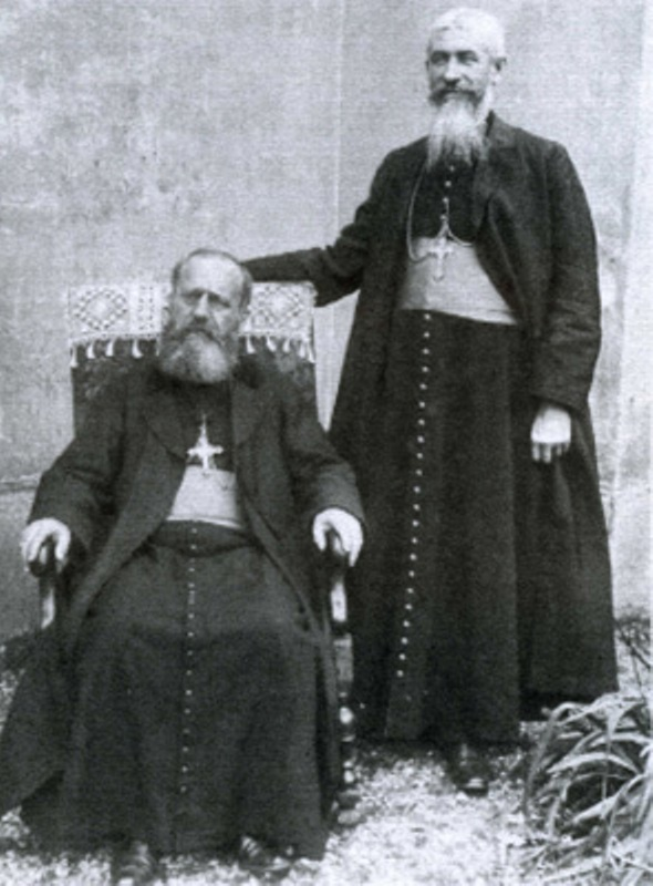 Bischöfe Paul Pellet SMA und François Steinmetz SMA